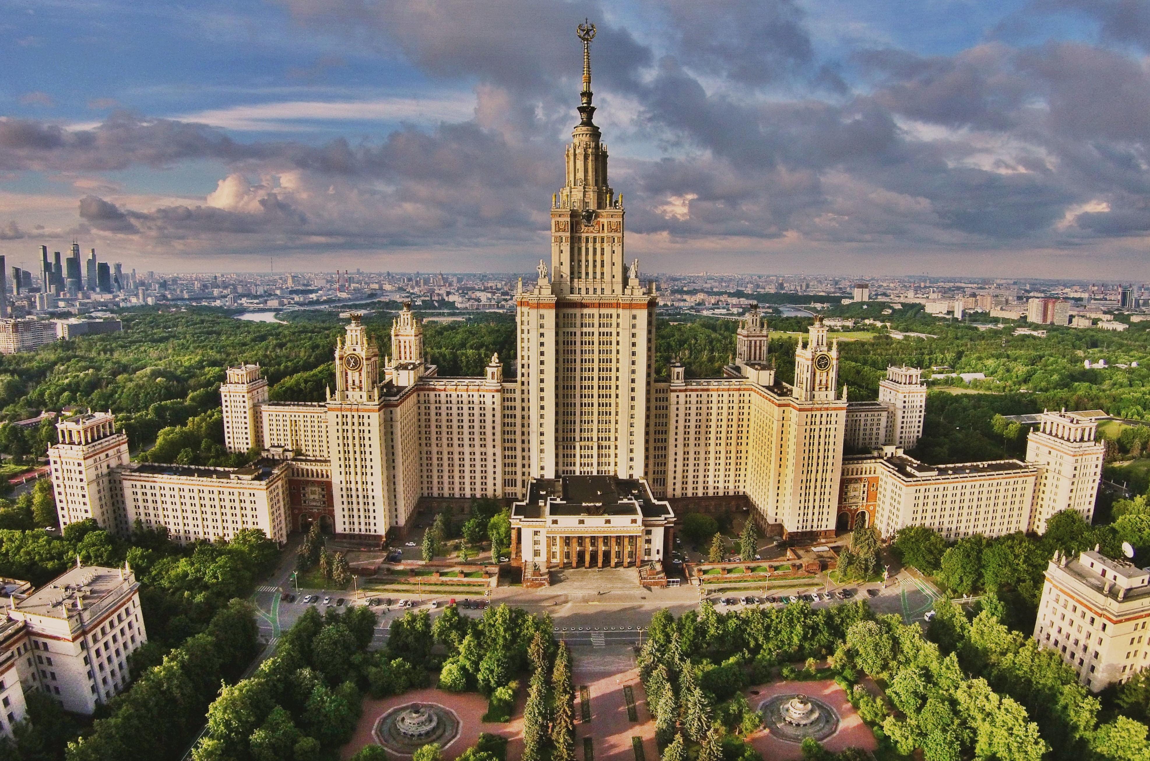 Комплекс зданий Московского государственного университета им. М.В.Ломоносова: Раменки, Западный округ, Москва